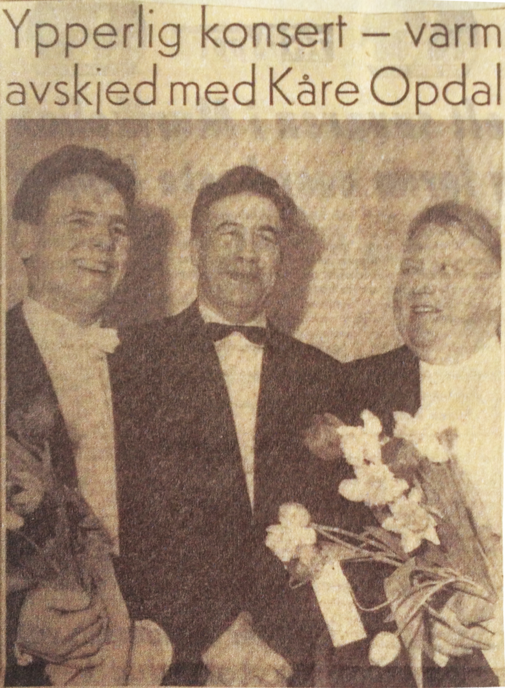 Dirigenten Kåre Opdal t.v. i bildet, pianisten Ivar Johnsen t.h. Begge norsked. Bildet er tatt i forbindelse med Opdals avskjedskonsert med Inntrøndelag symfoniorkester i mars 1961.